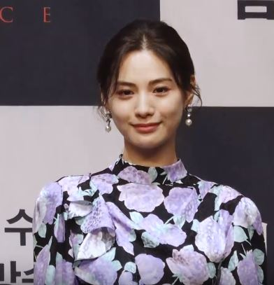 KBS 2TV 수목드라마 '저스티스' 제작발표회가 17일 오후 서울 구로구 신도림 라마다 호텔에서 열렸다.